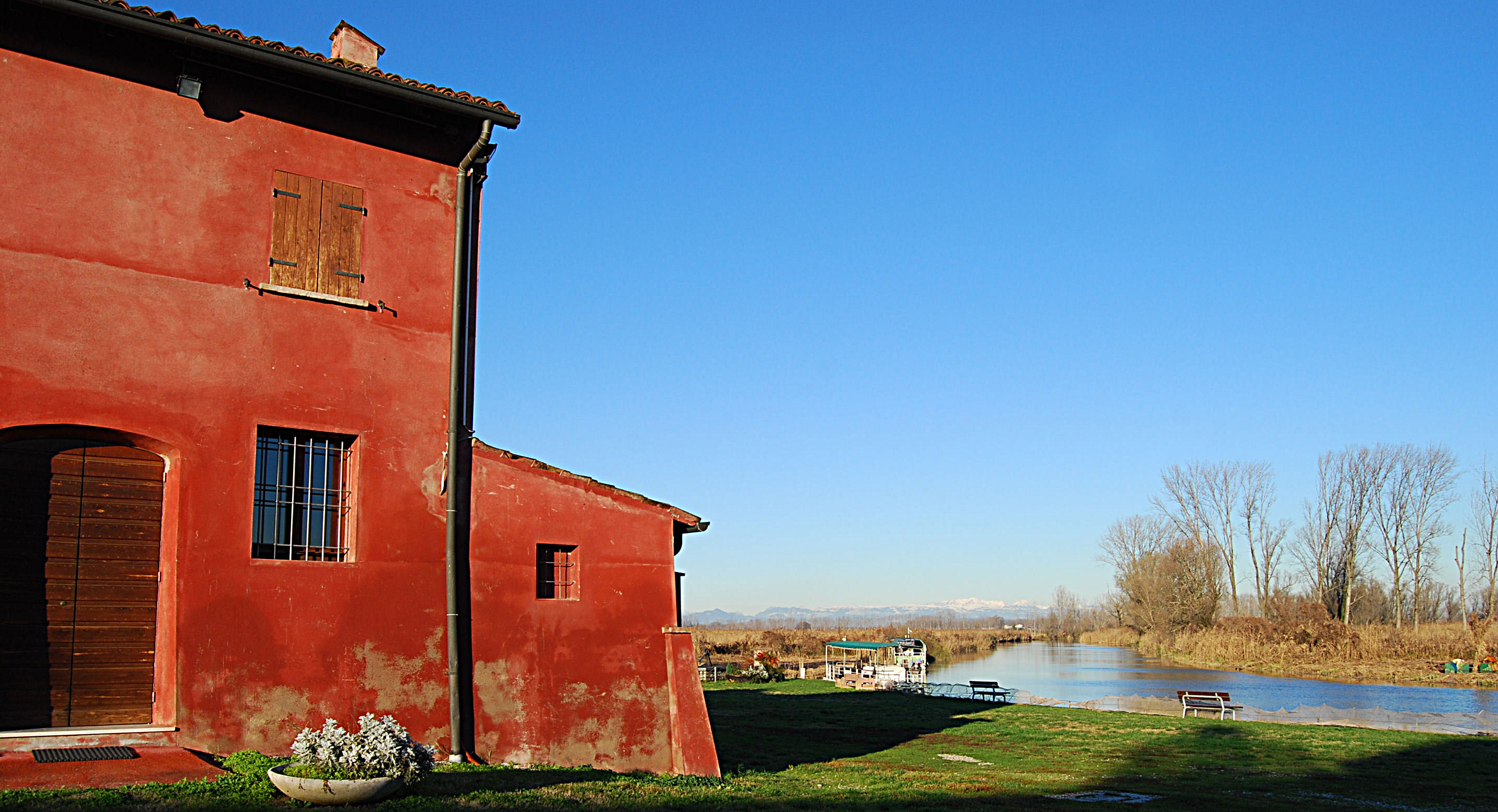 Rivalta sul Mincio, panorama.